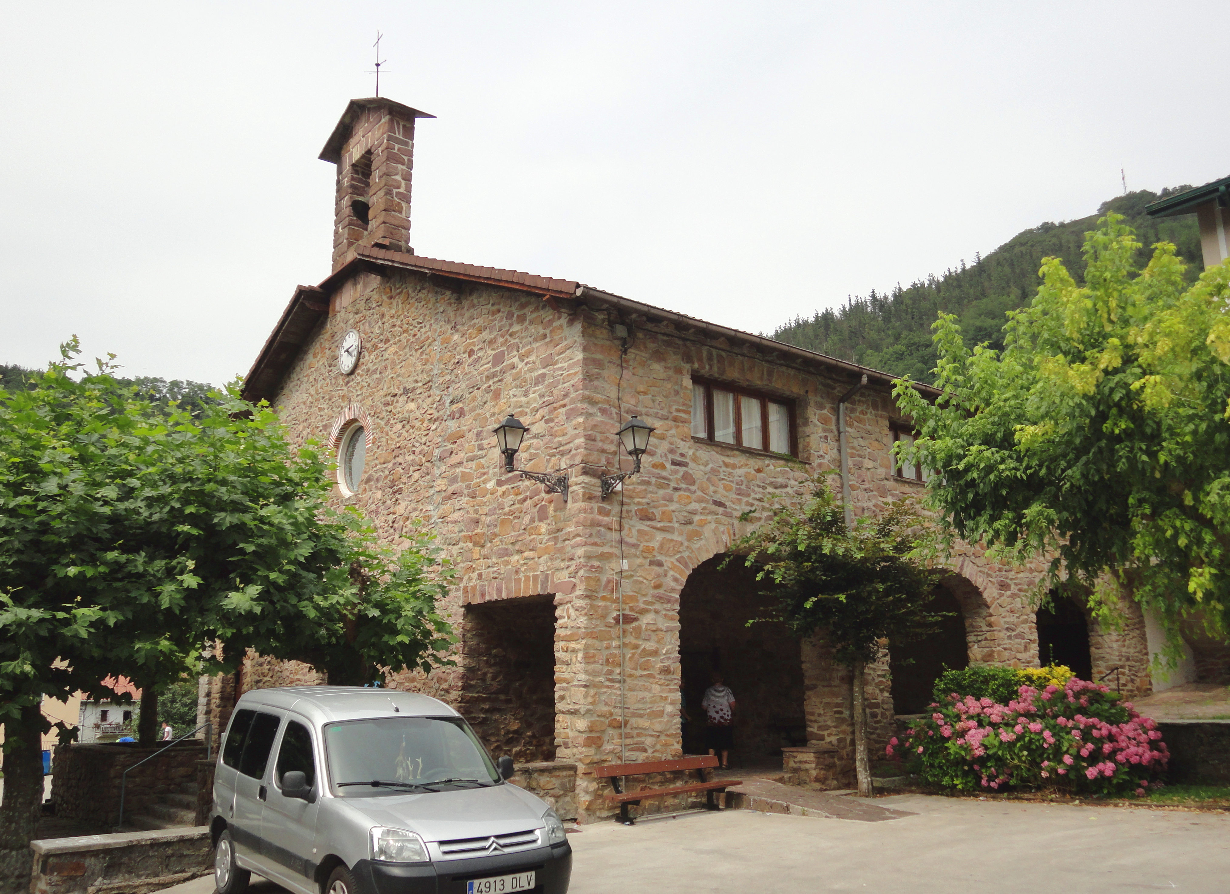 San Antonio eliza - Ereñotzu